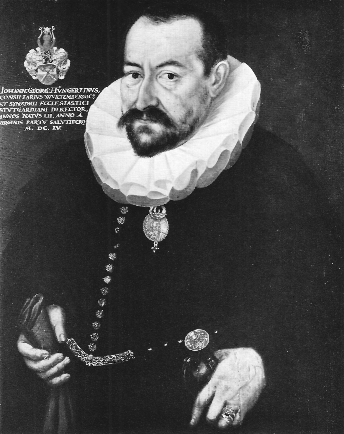 Prof. Johann Georg Hüngerlin (Ölbildnis in der Tübinger Professorengalerie)